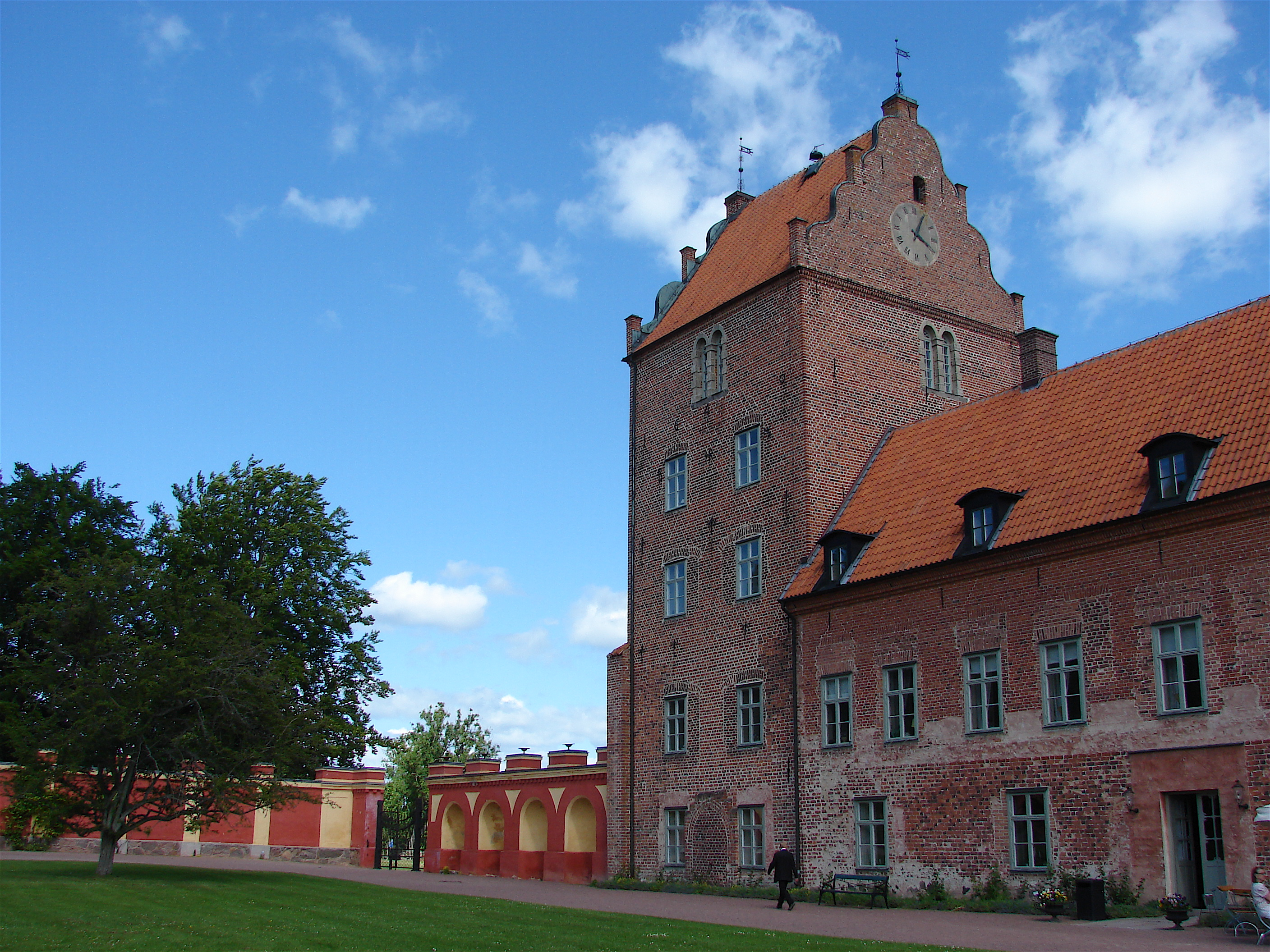 Bäckaskog kloster, Bækkeskov Kloster, Scania, Skåne